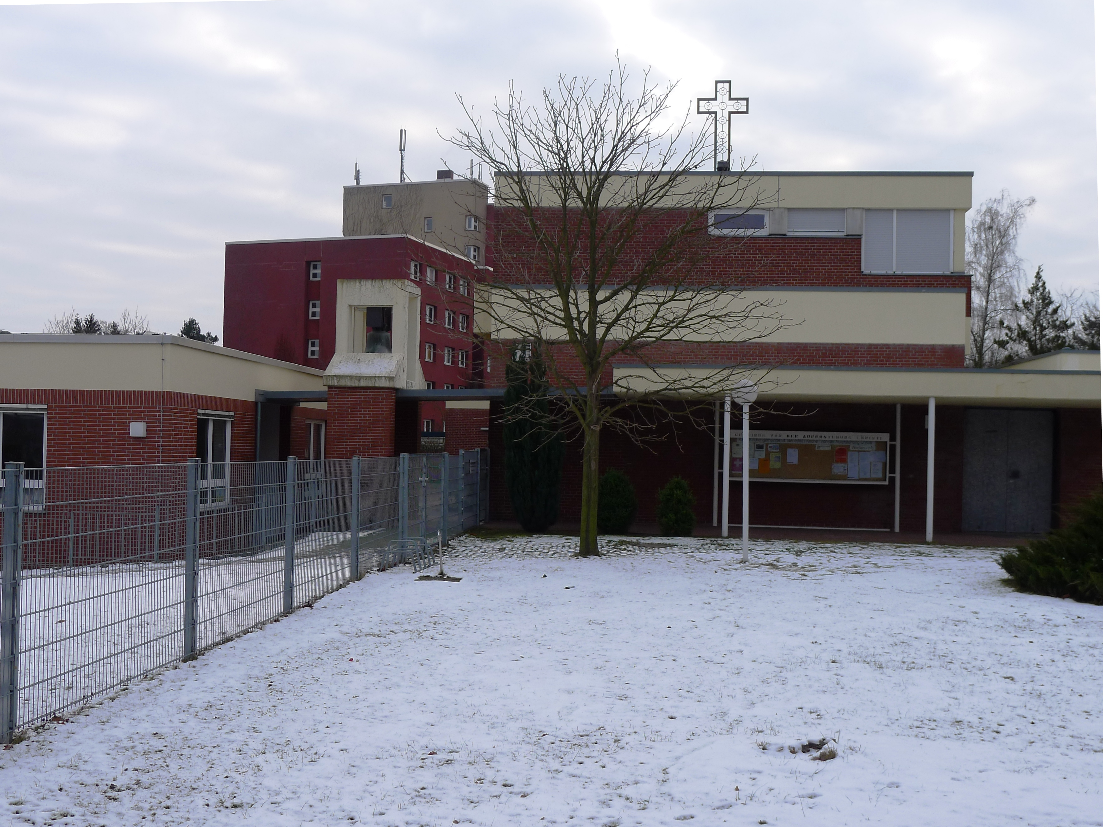 Blick vom Kamenzer Damm auf das Gemeindezentrum